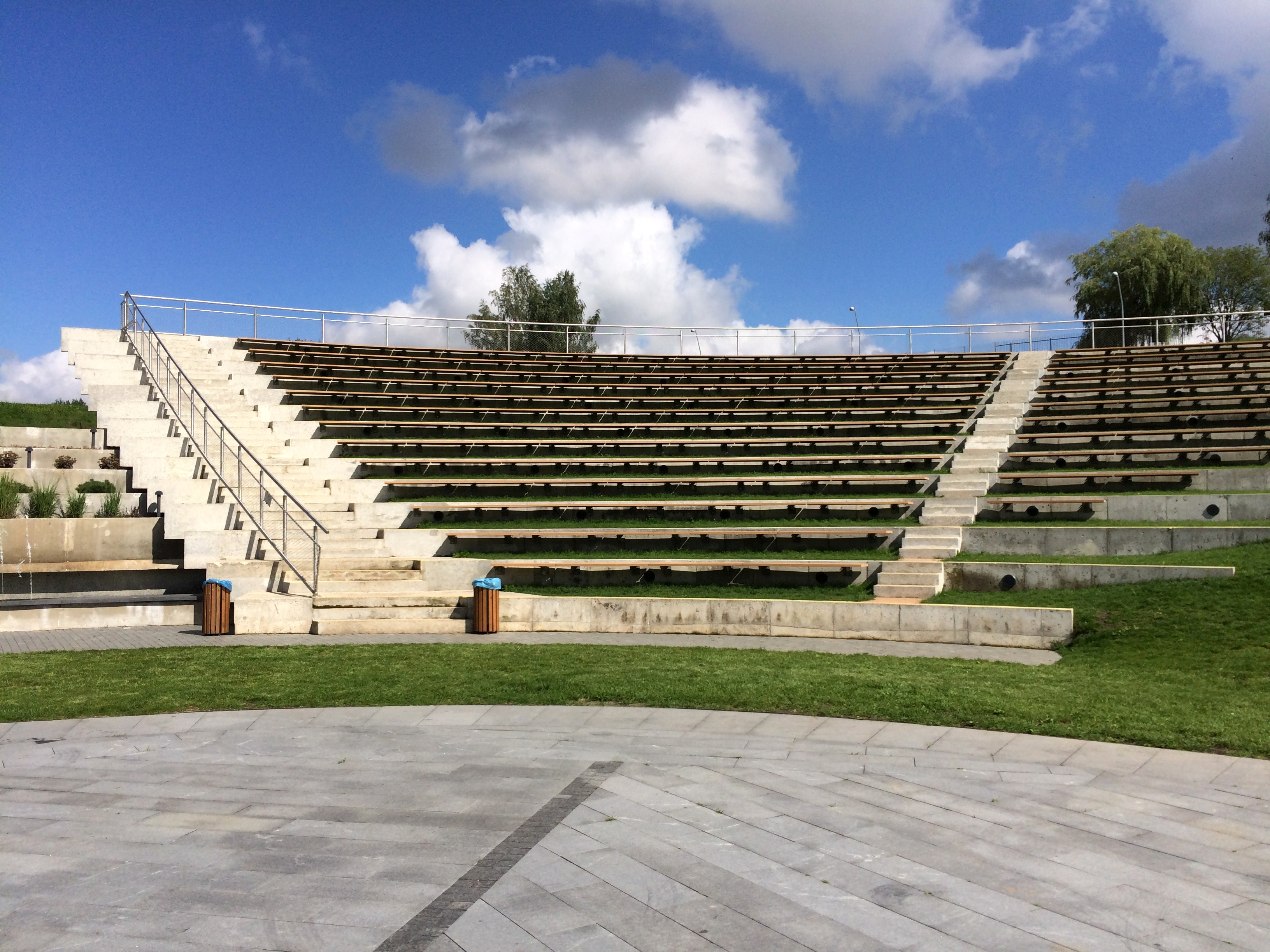 Joninių slėnio amfiteatras